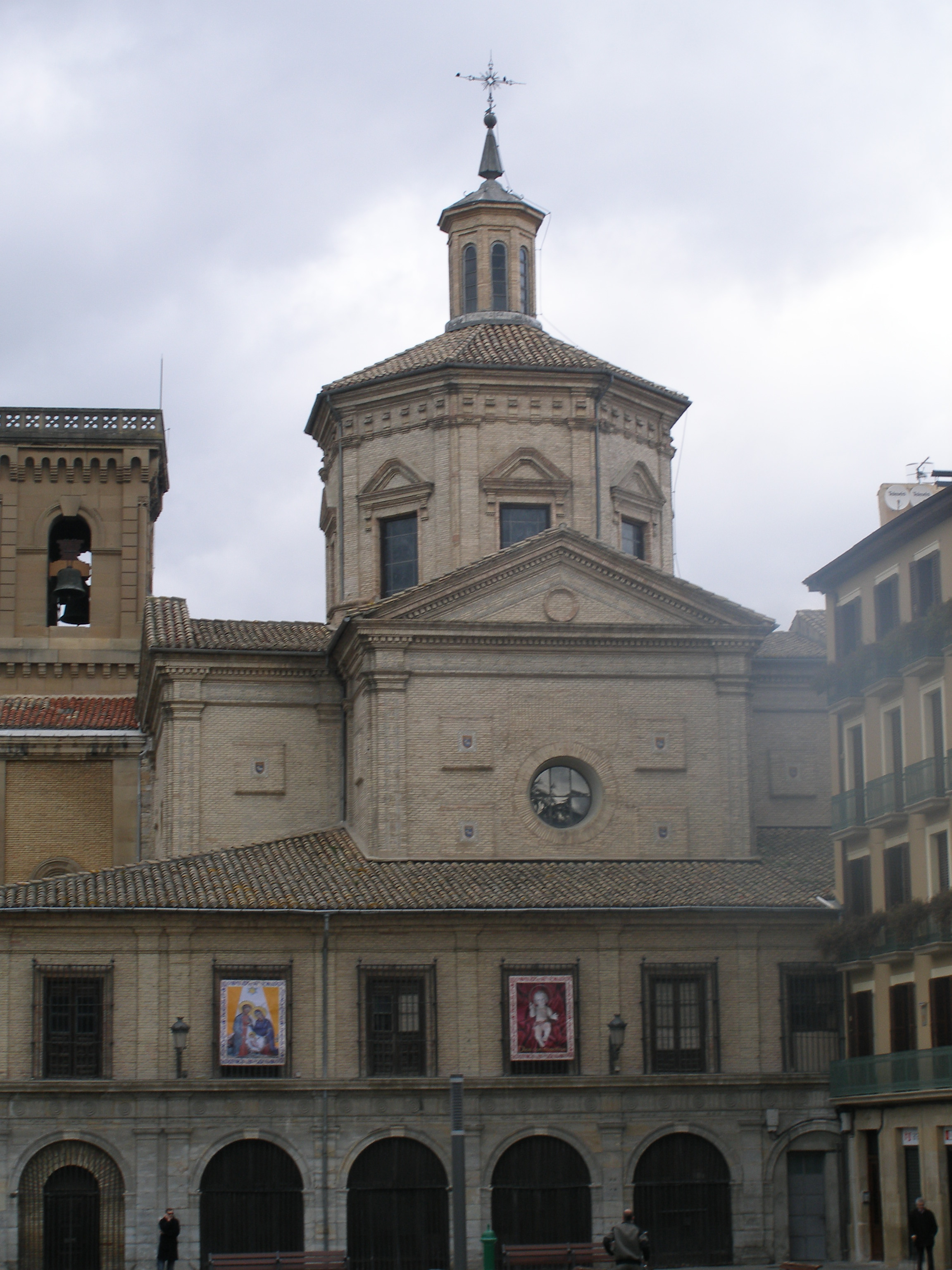 San Lorenzo eliza, bere San Fermin kapera kanpotik ilusita.